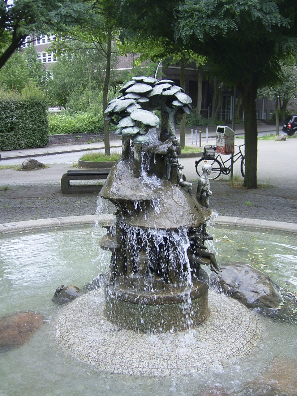 Der Brunnen am Veddeler Stieg auf der Veddel wurde 1983 von Doris Waschk Balz geschaffen.